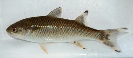 Tepemechin or mountain mullet (Agonostomus monticola), pez en peligro de extincion de mi pais Honduras, se da en el Rio Cangrejal.